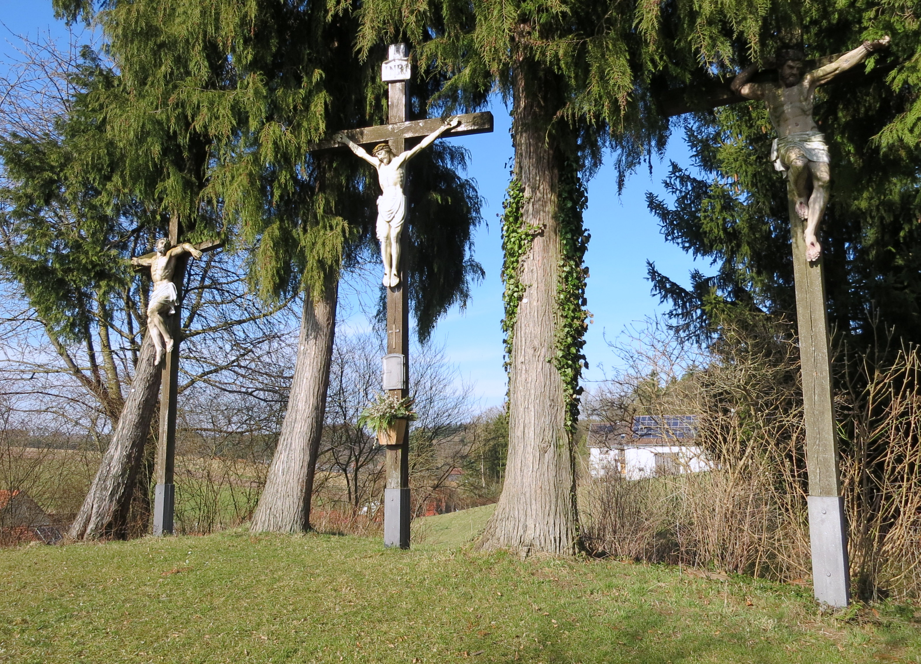 Kreuzwegstationen und Kalvarienberg